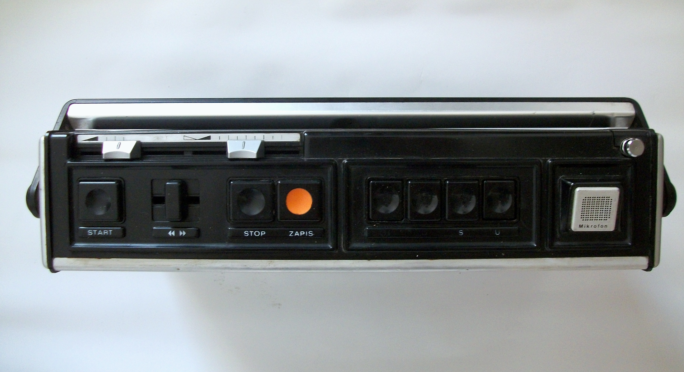 Radiomagnetofon RB3200 Grundig Unitra